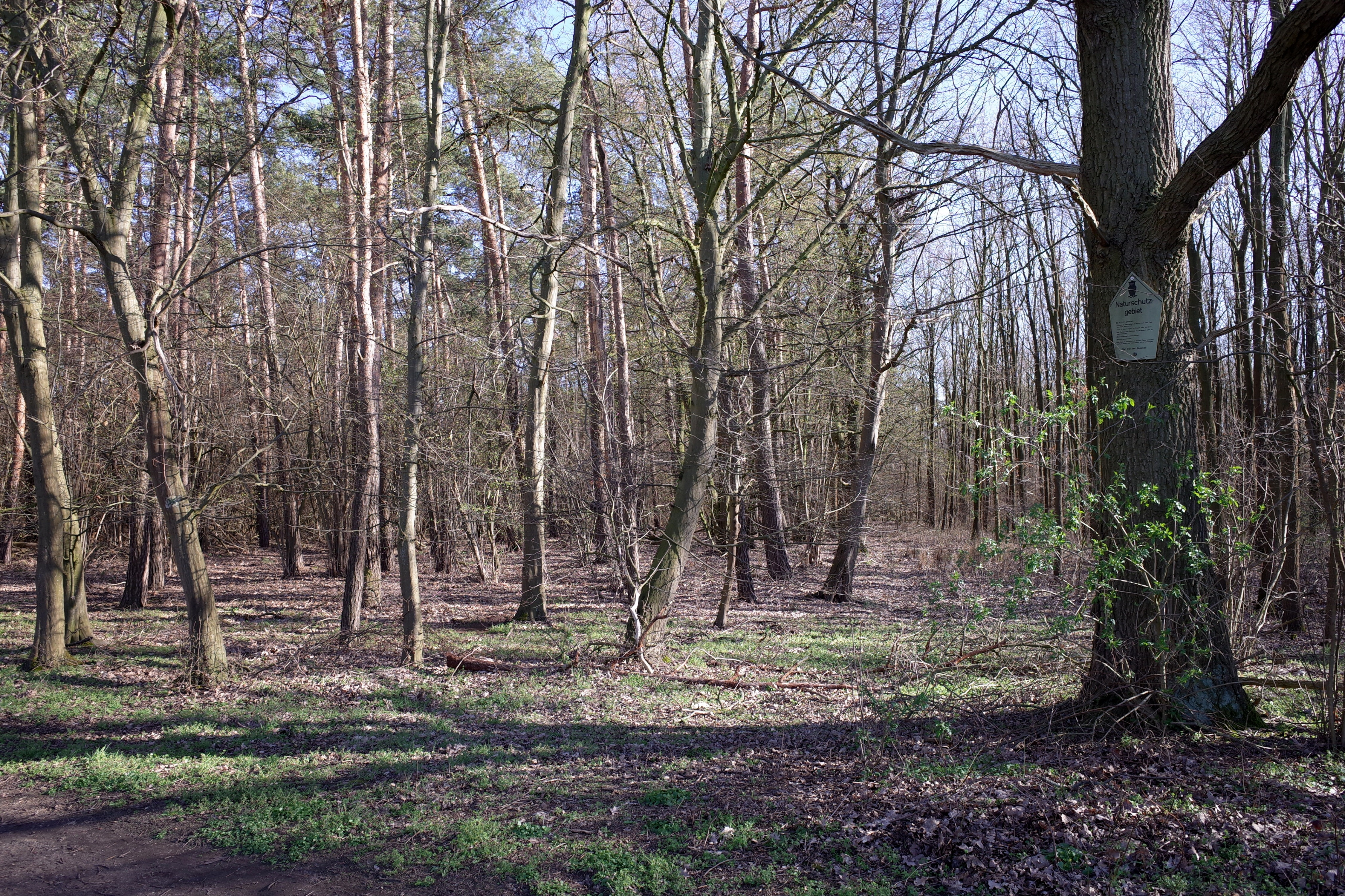 Dessau-Roßlau, Ortsteil Mosigkau, Naturschutzgebiet Rößling